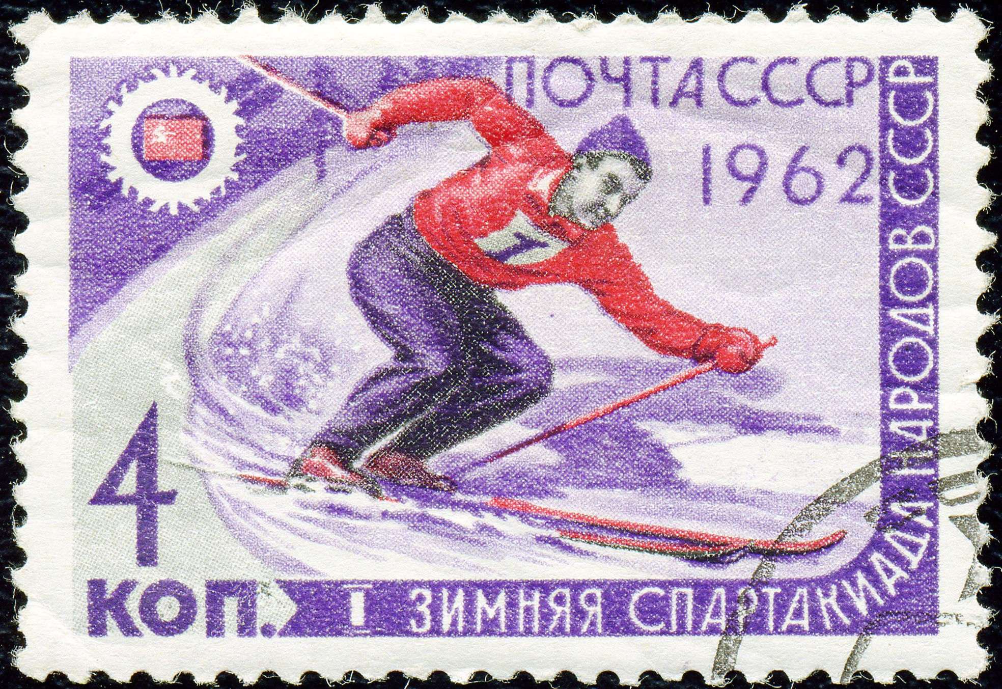 Почтовая марка СССР. 1962. I зимняя спартакиада народов СССР